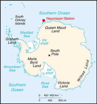 Nuemayer Station, Antarktis, Karte: CIA World Factbook (Public Domain), von mir bearbeitet